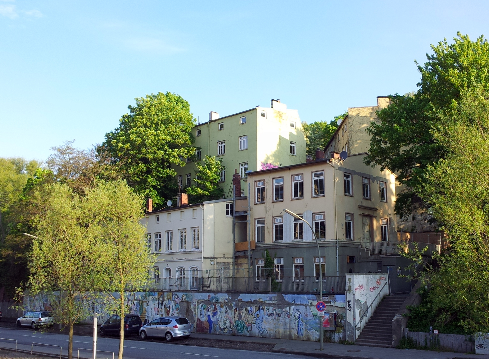 elbtreppenhäuser in hamburg altona neumühlen